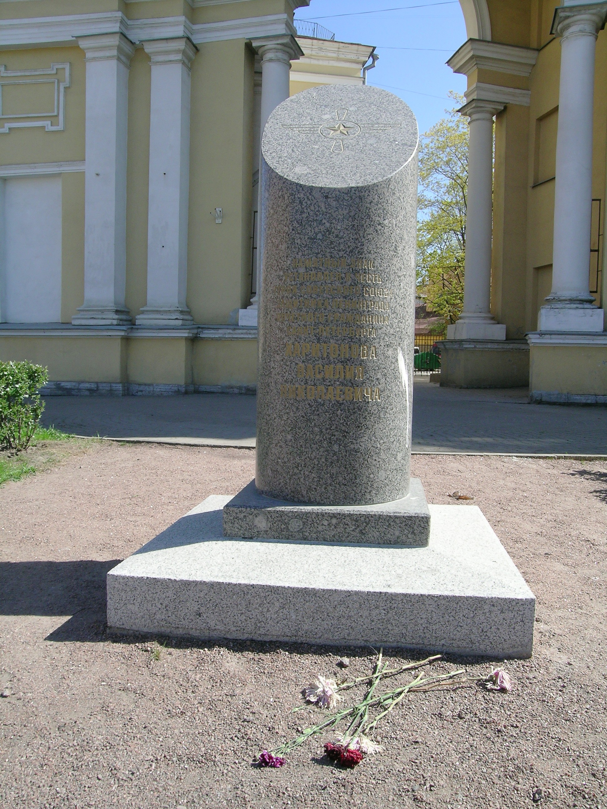 Памятный знак Харитонову Василию Николаевичу. Открыт 4 мая 2010 года на углу Лермонтовским пр. и наб. кан. Грибоедова (Официальное название «Сквер В. Н. Харитонова») скульптор Виктор Сиваков. Харитонов Василий Николаевич — Герой Советского Союза